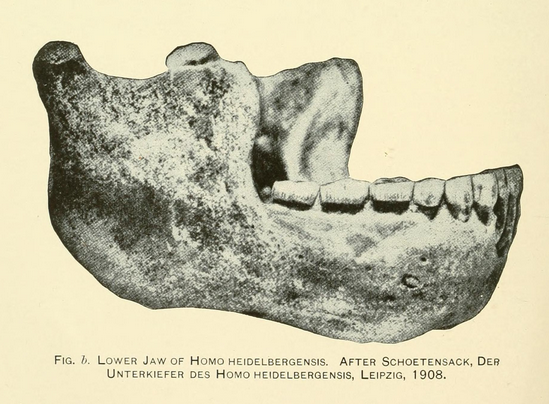 Lugar del descubrimiento de Mauer 1